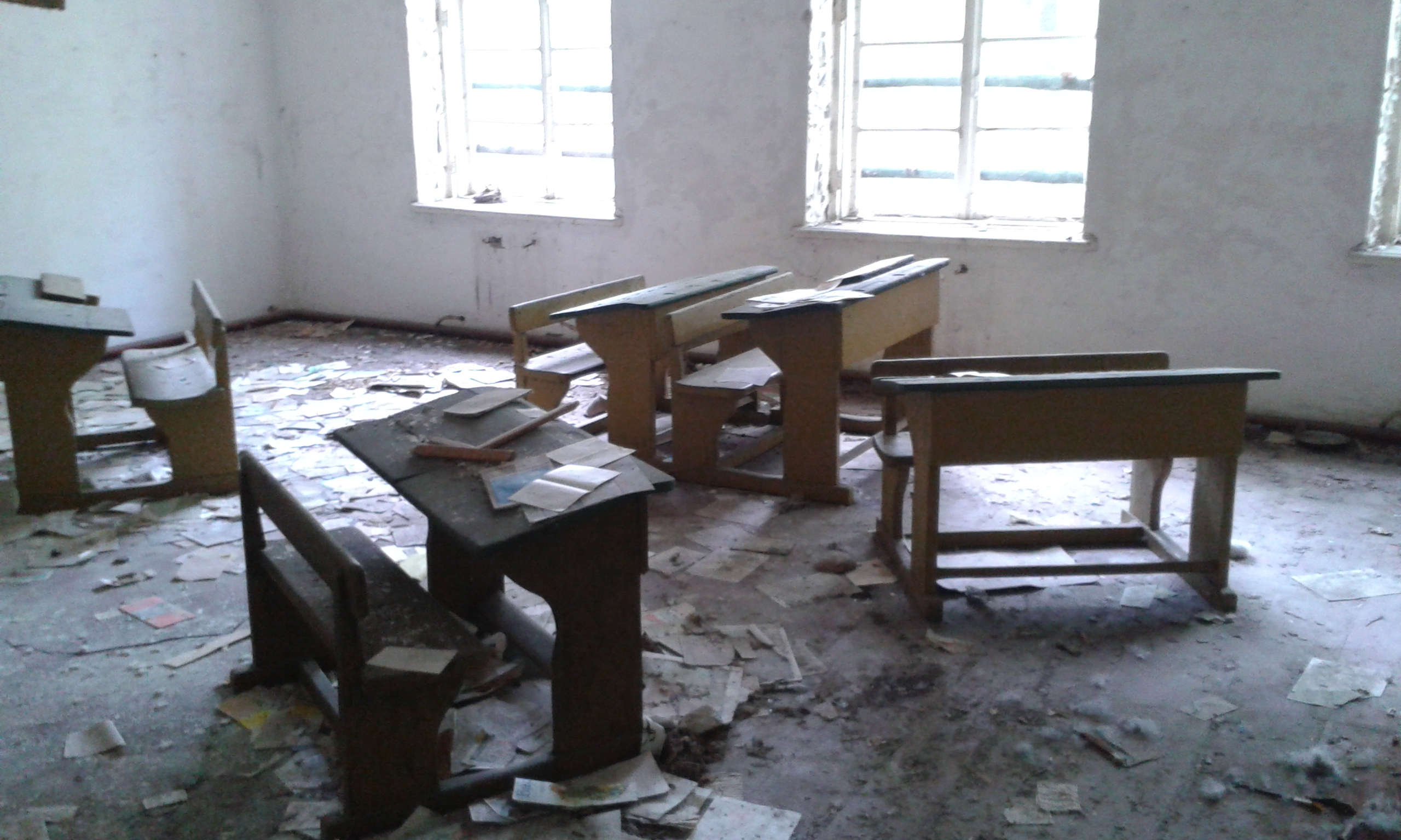 Заброшенная школа в селе Лубянка (Чернобыльского) Полесского района